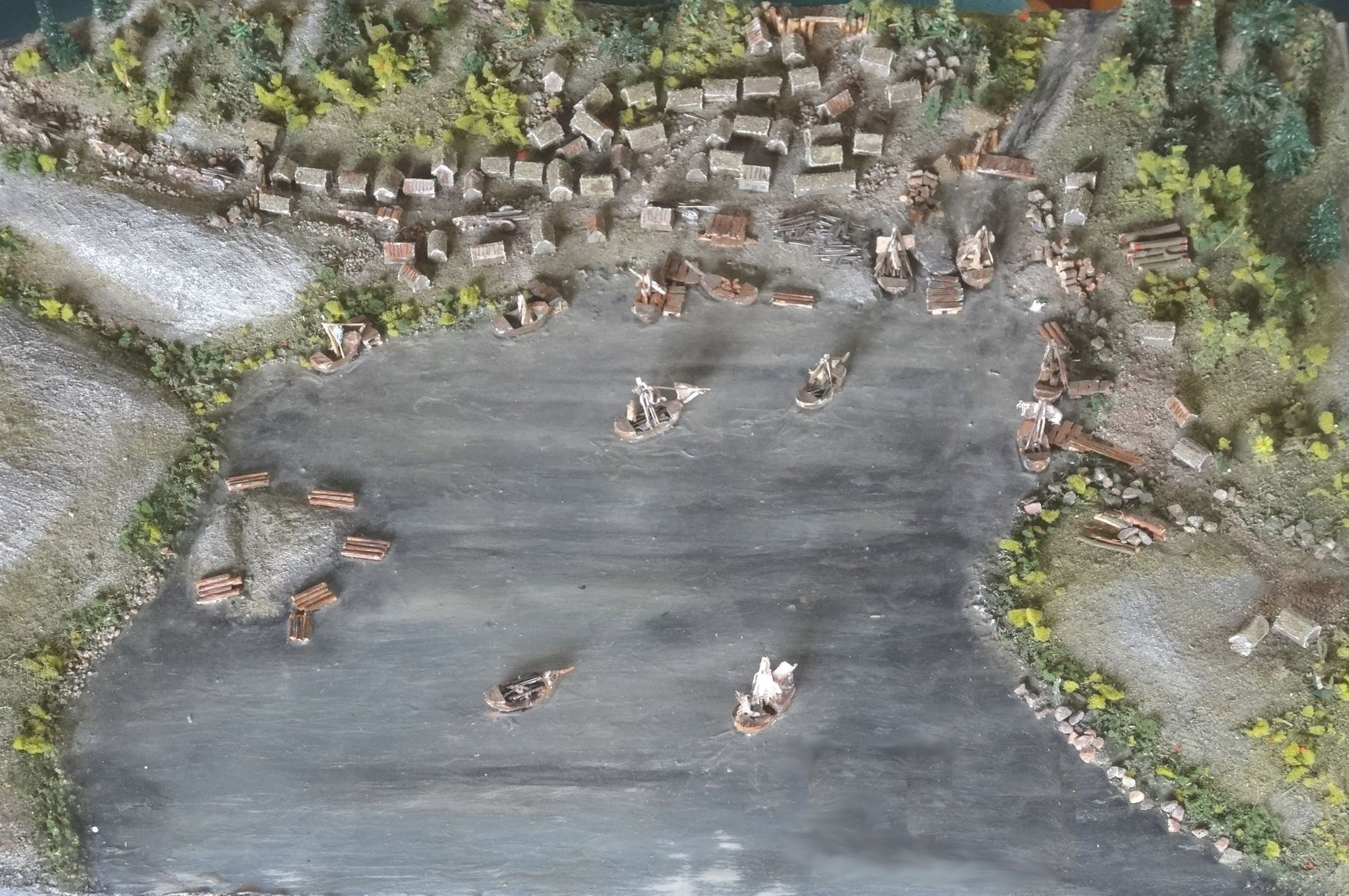 Modell av senmedeltida staden Brätte, föregångare till Vänersborg, vy från norr.